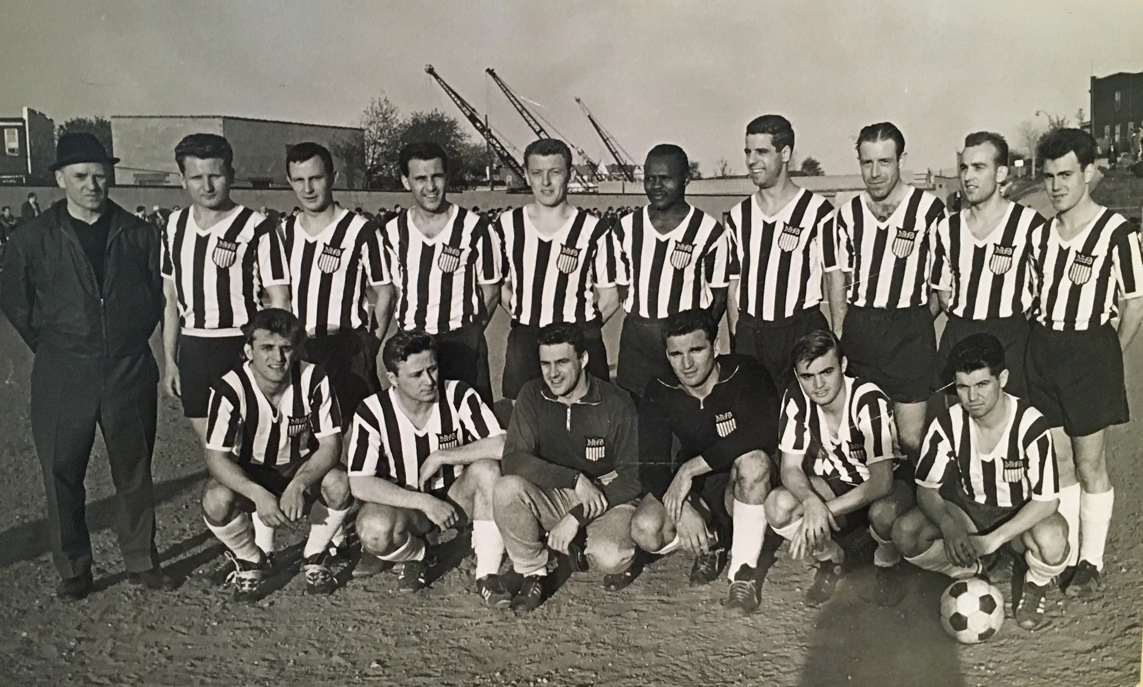 Johann Herberger (links) mit der Auswahlmannschaft der German American Soccer League (GASL) um 1960 in New York.